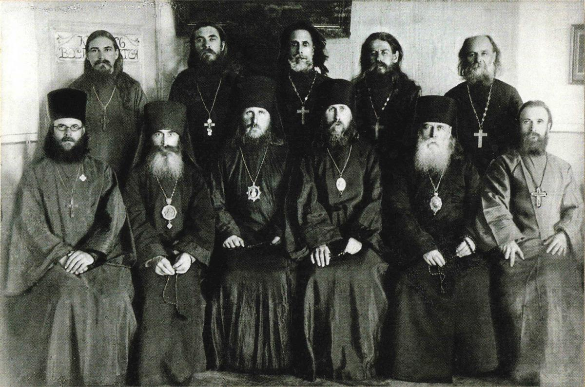 Соловецкий лагерь. Январь, 1923 год. Слева направо - сидят: священник Алексий Шишкин, архиепископ Митрофан (Гринёв), архиепископ Иларион (Троицкий), митрополит Евгений (Зернов), архиепископ Захарий (Лобов), протоиерей Павел Чехранов; стоят: протоиерей Симеон Краснов, протоиерей Илия Пироженко, священник Алексий Трифильев, священник Владимир Вологурин, протоиерей Петр Фалевич